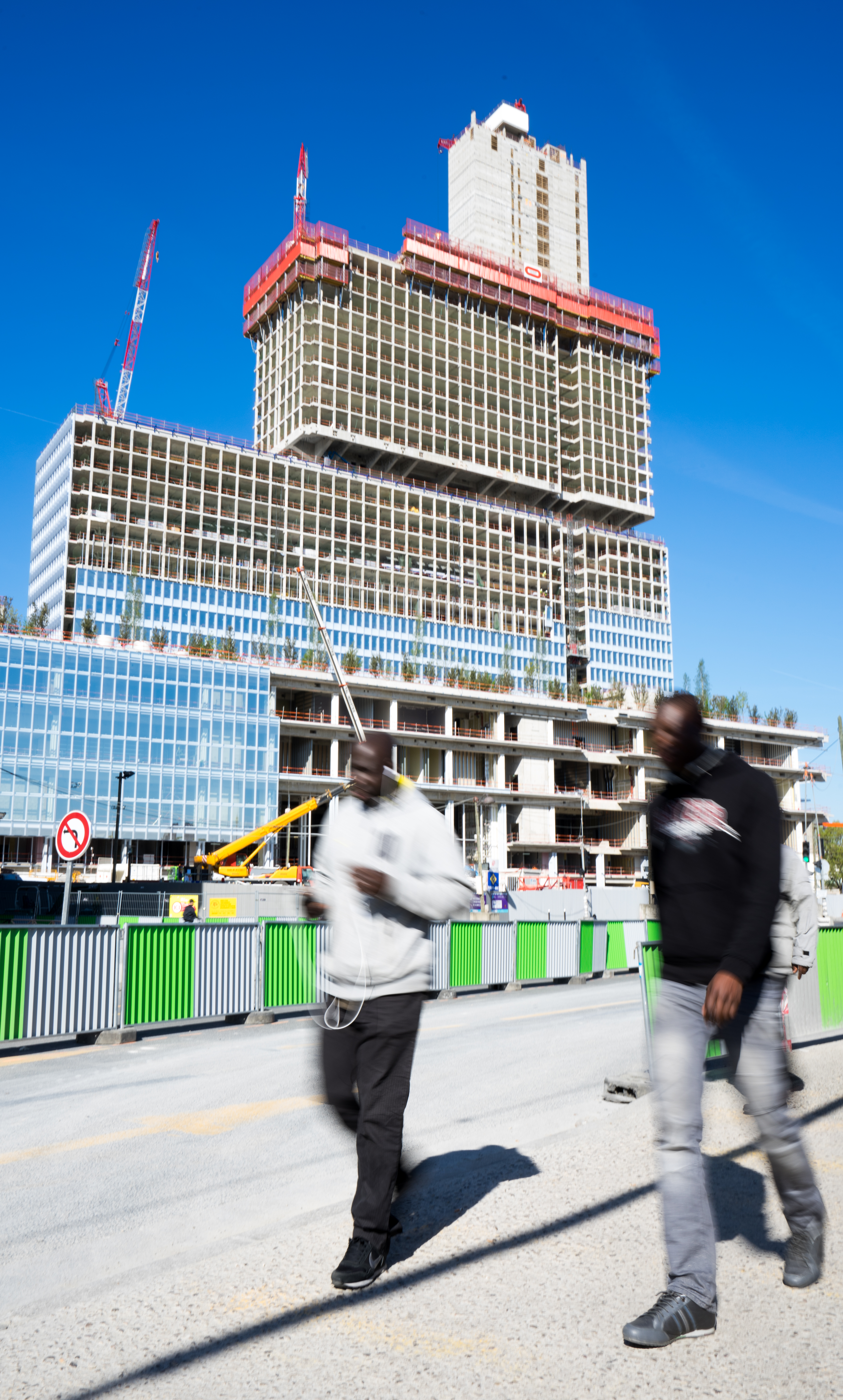 Paris XVII°